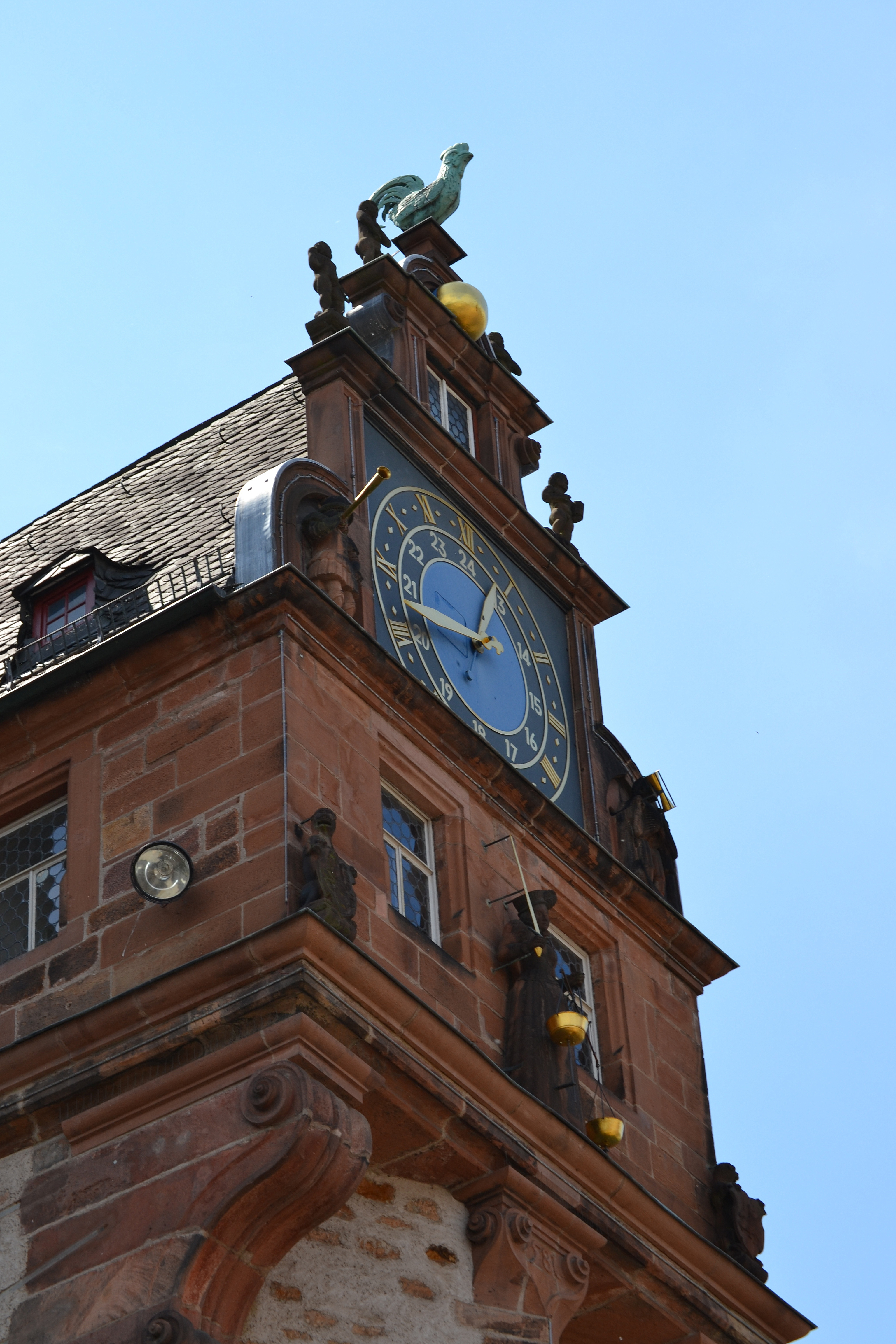 Rathausuhr Marburger Rathaus